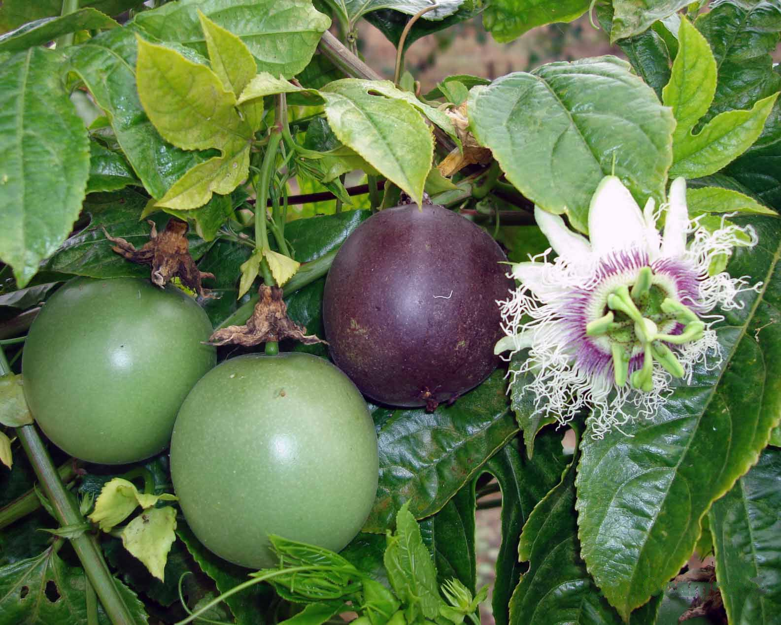 Passiflora edulis f. edulis (Subgénero Passiflora), fotografía tomada en los Andes colombianos (Manizales - Colombia).